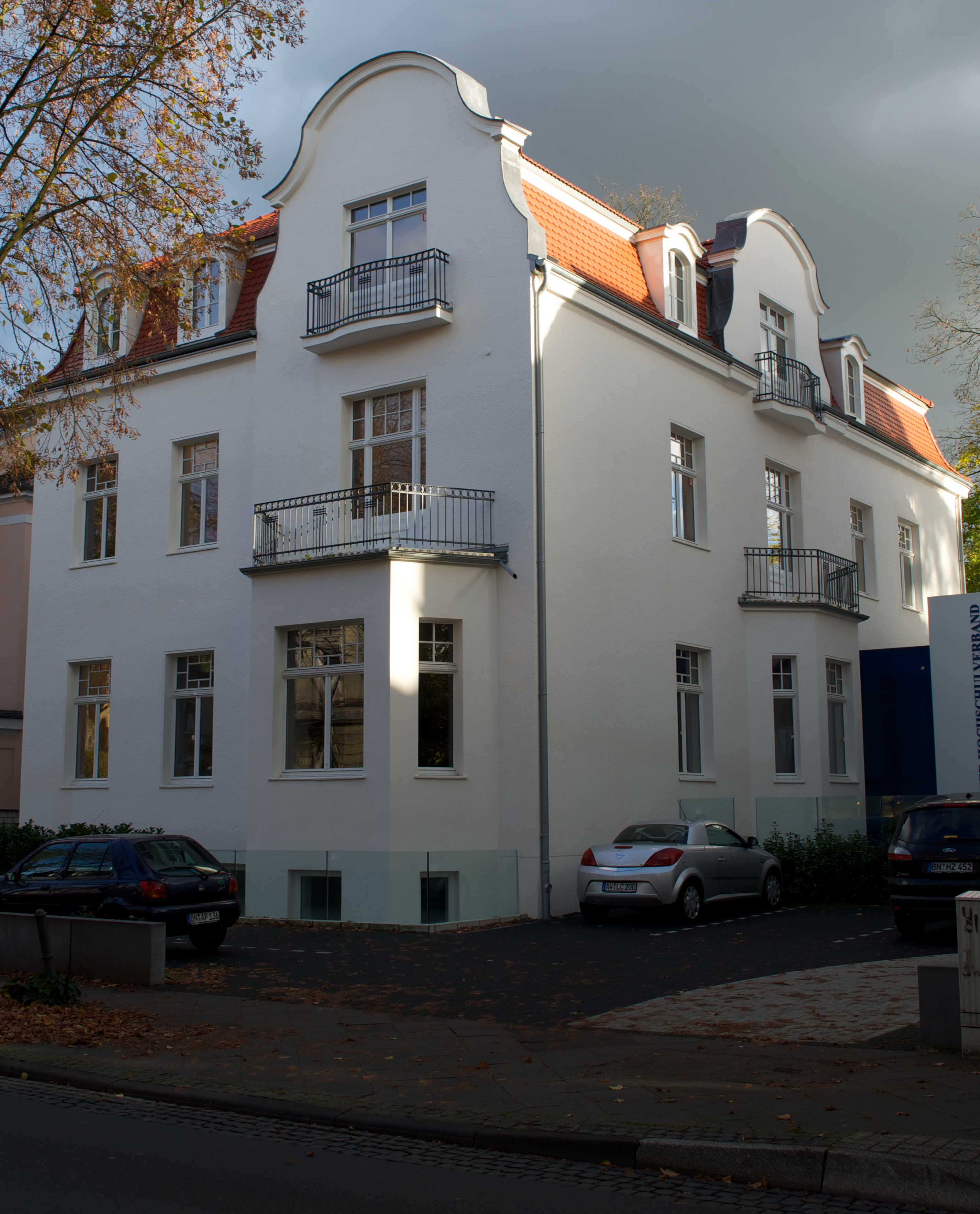 Denkmalgeschütztes Wohnhaus Rheinallee 20 (ehem. Botschaft von Sierra Leone) in Bad Godesberg, Ortsteil Godesberg-Villenviertel